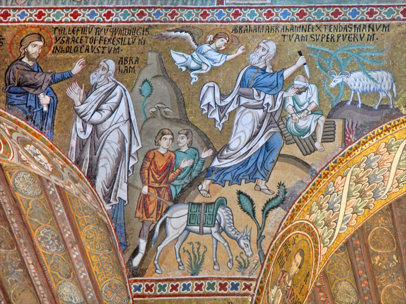 Le sacrifice d'Isaac par Abraham et l'intervention d'un Ange qui arrête son bras L'intérieur de la chapelle date de la fin de la décennie 1130, jusque dans les années 1150-1160 Au Xe siècle, la Sicile est rattachée au califat fatimide du Caire. L’île reste sous domination musulmane jusqu’à l’arrivée des Normands, qui, en 1059, obtiennent la souveraineté des mains de la Papauté décidée à rechristianiser des territoires que Byzance n’était plus capable de reconquérir. La conquête normande s’échelonne entre 1060 à 1090. Finalement, en 1130, Roger II (1130-1154) obtient la couronne de l’antipape Anaclet II (1130-1138) et rassemble les territoires normands en un royaume, choisissant naturellement Palerme comme capitale. Il y fait construire un palais et, dans celui-ci, un riche édifice cultuel, la Chapelle palatine, qui, par son architecture et son décor, demeure un exemple exceptionnel de métissage des arts chrétiens d’Orient et d’Occident, et d’art islamique. Article de Qantara sur la chapelle palatine Article de Wikipedia sur le palais des Rois Normands